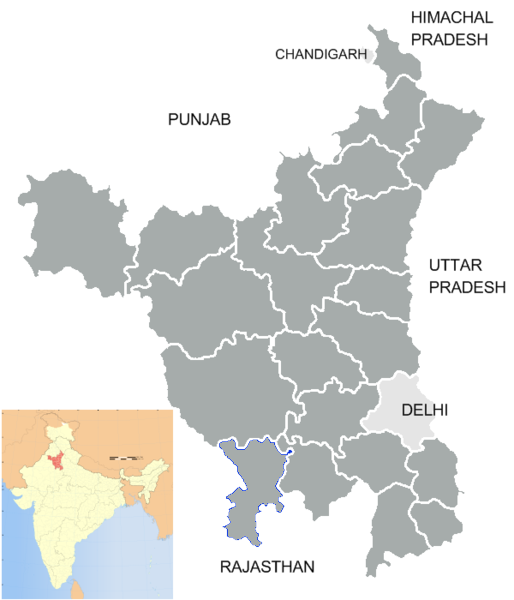 Locator map derived from HaryanaMahendragarh.png